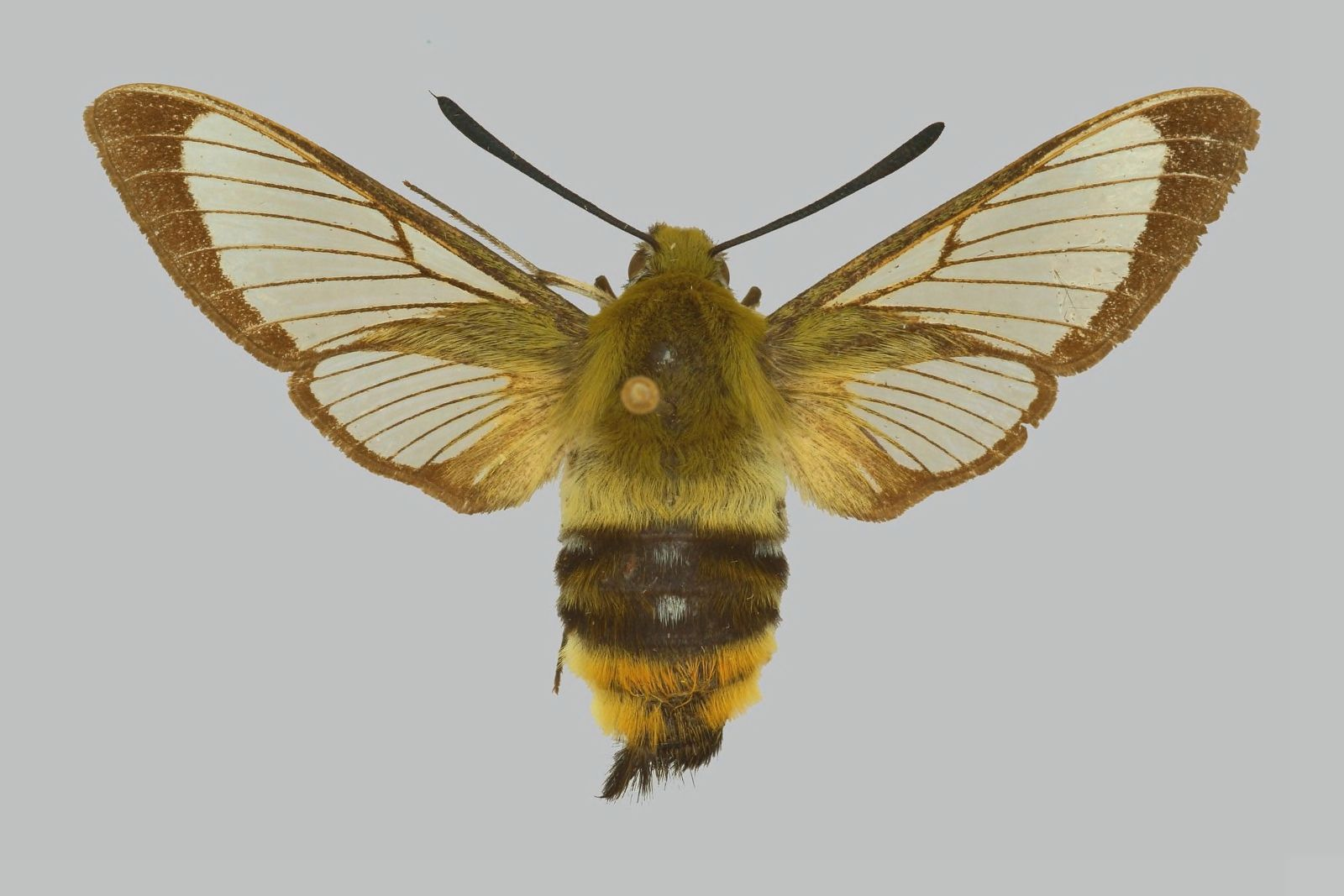 Hemaris aksana, female, upperside. Morocco, Ifrane